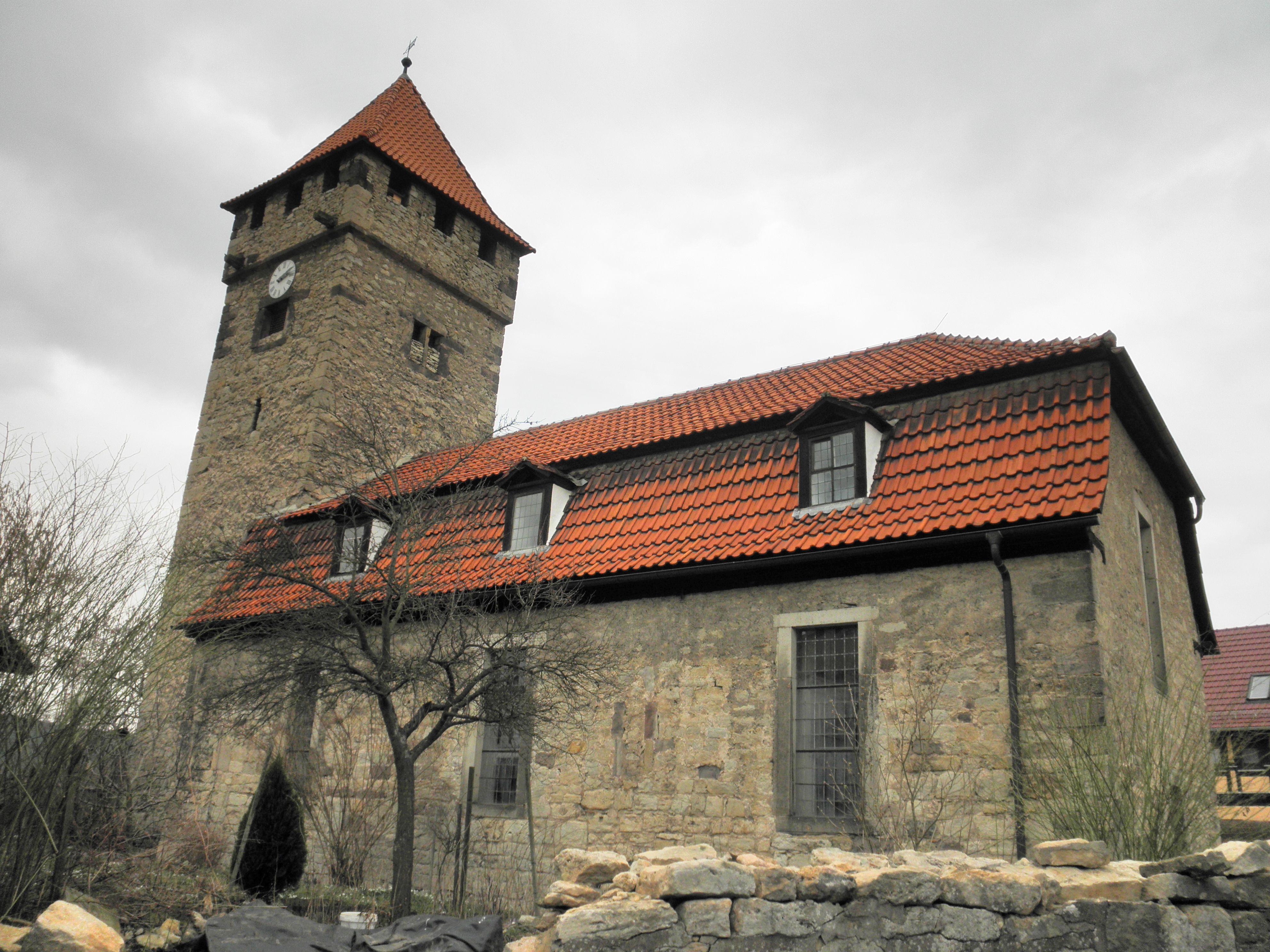 Wehrkirche Siegelbach